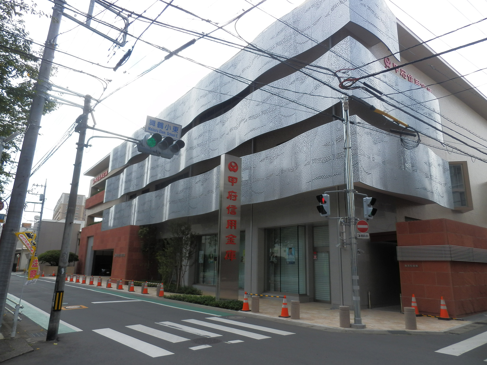 甲府信用金庫新本店